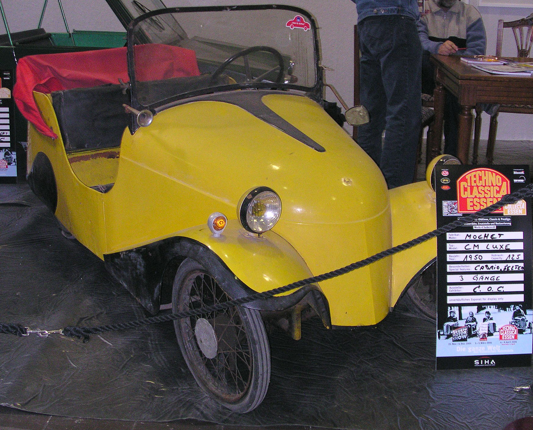 Mochet CM Luxe, Baujahr 1950, 125 cm³ Hubraum, 3 Gänge, gesehen auf der Technoclassica 2005 in Essen